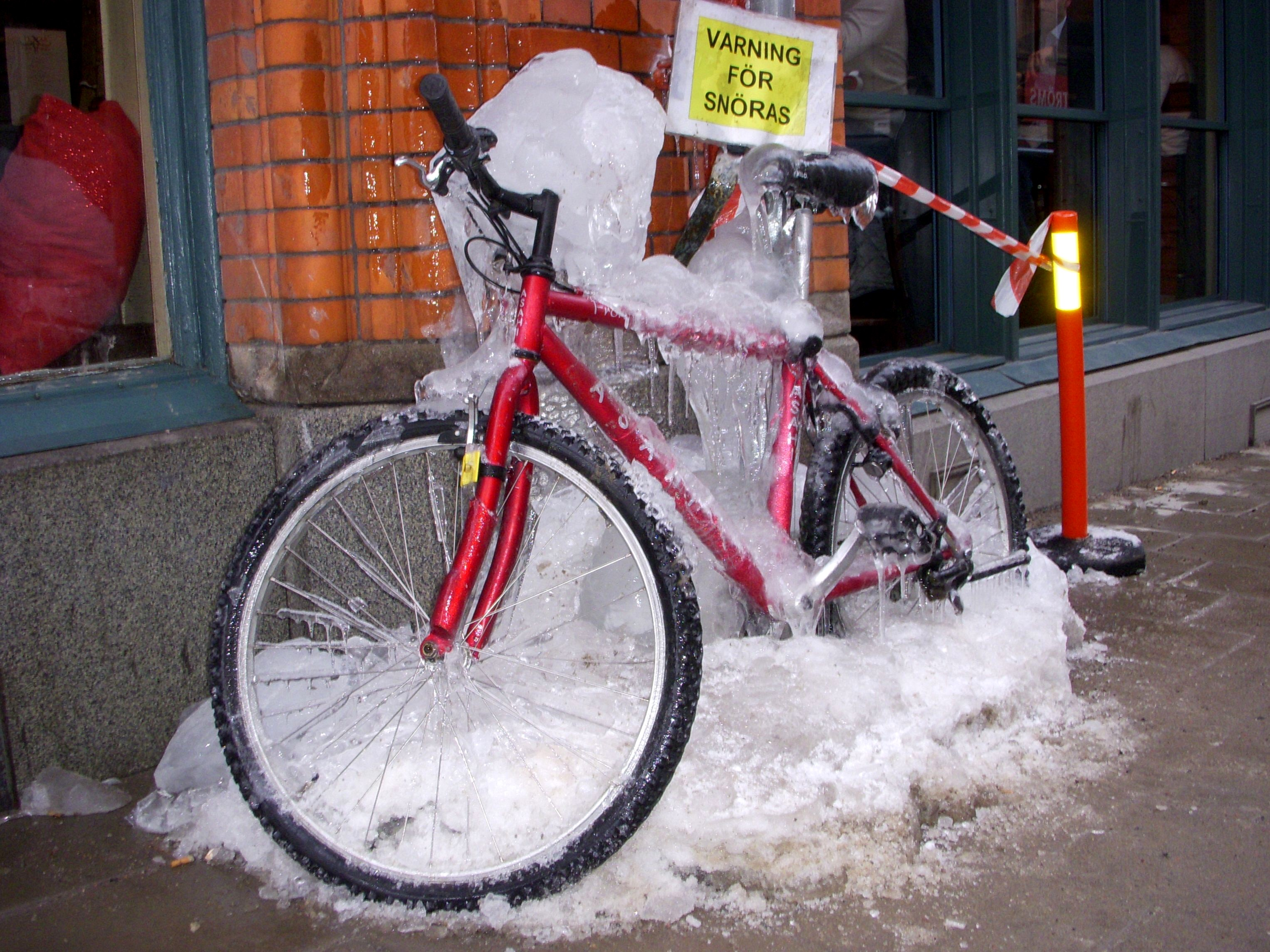 Humlegårdsgatan (vid Östermalms saluhall) i februari 2010